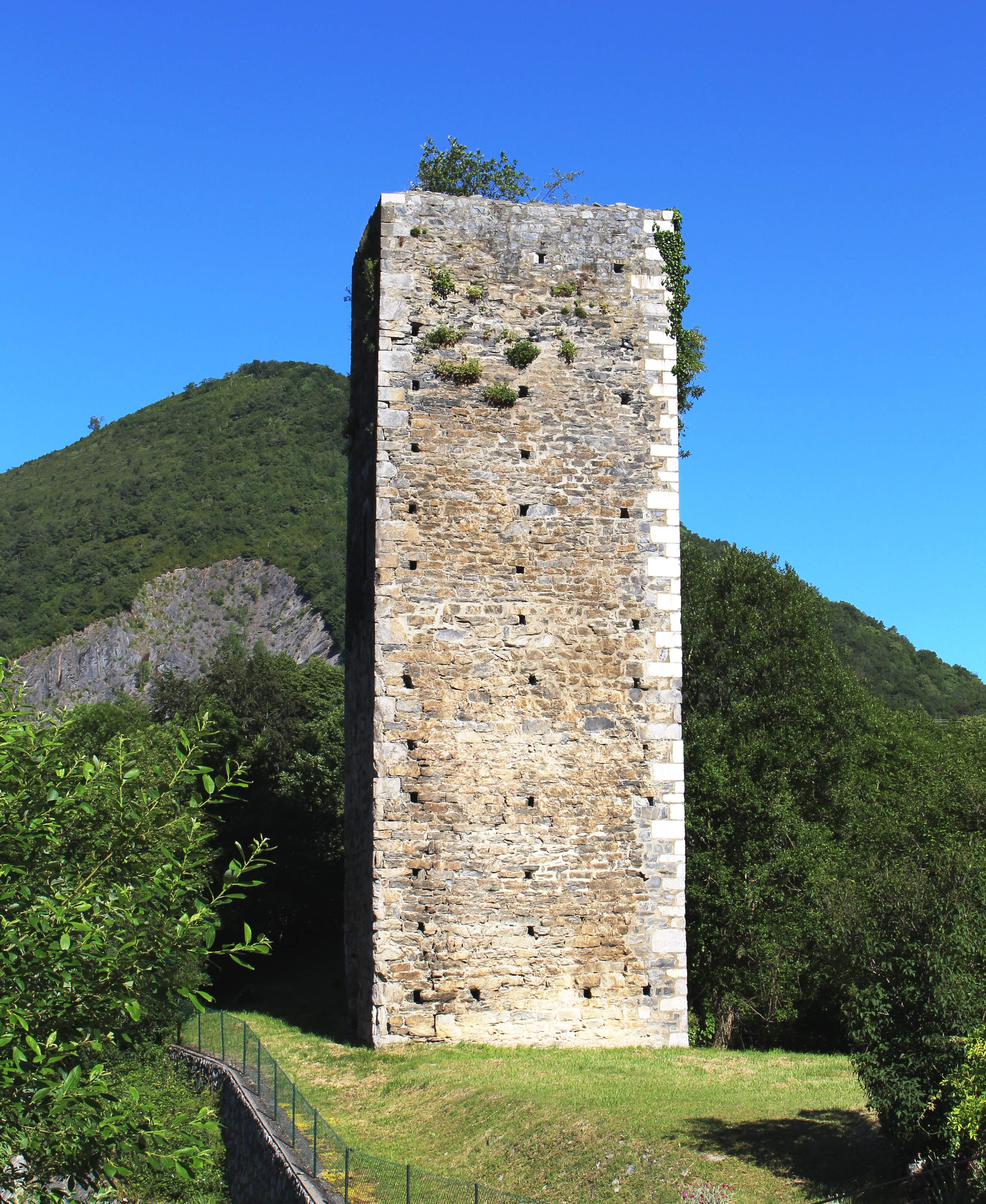 Château de Hèches (Hautes-Pyrénées)